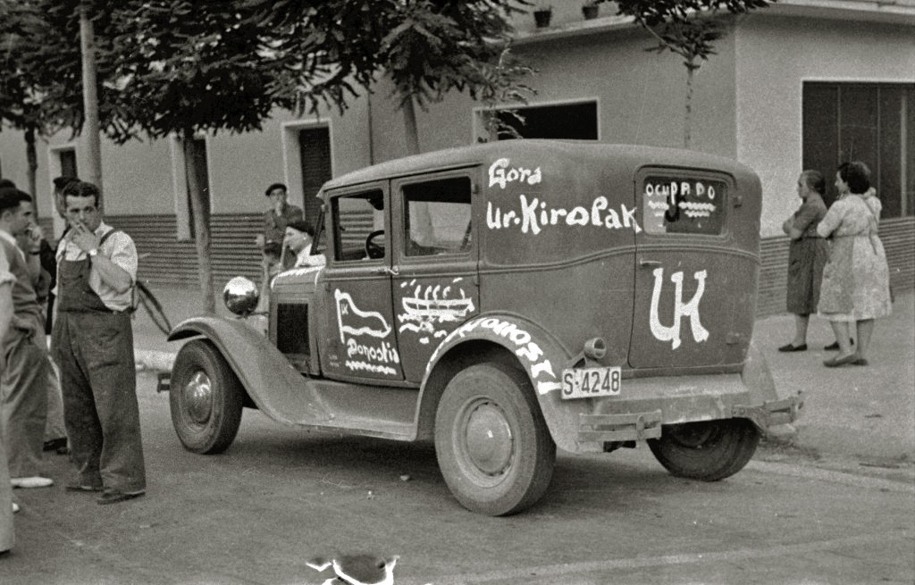 Título original: Recibimiento a los remeros de Ur-Kirolak en San Sebastián (8/8) Localización: San Sebastián (Guipúzcoa)